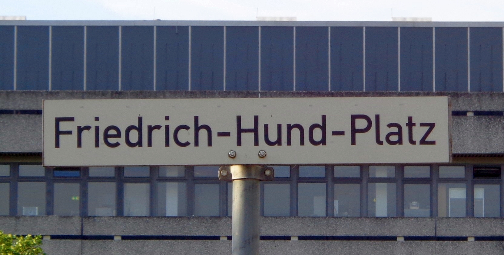 Nordcampus der Georg-August-Universität Göttingen: "Friedrich-Hund-Platz", benannt nach dem deutschen Physiker Friedrich Hund (1896–1997).